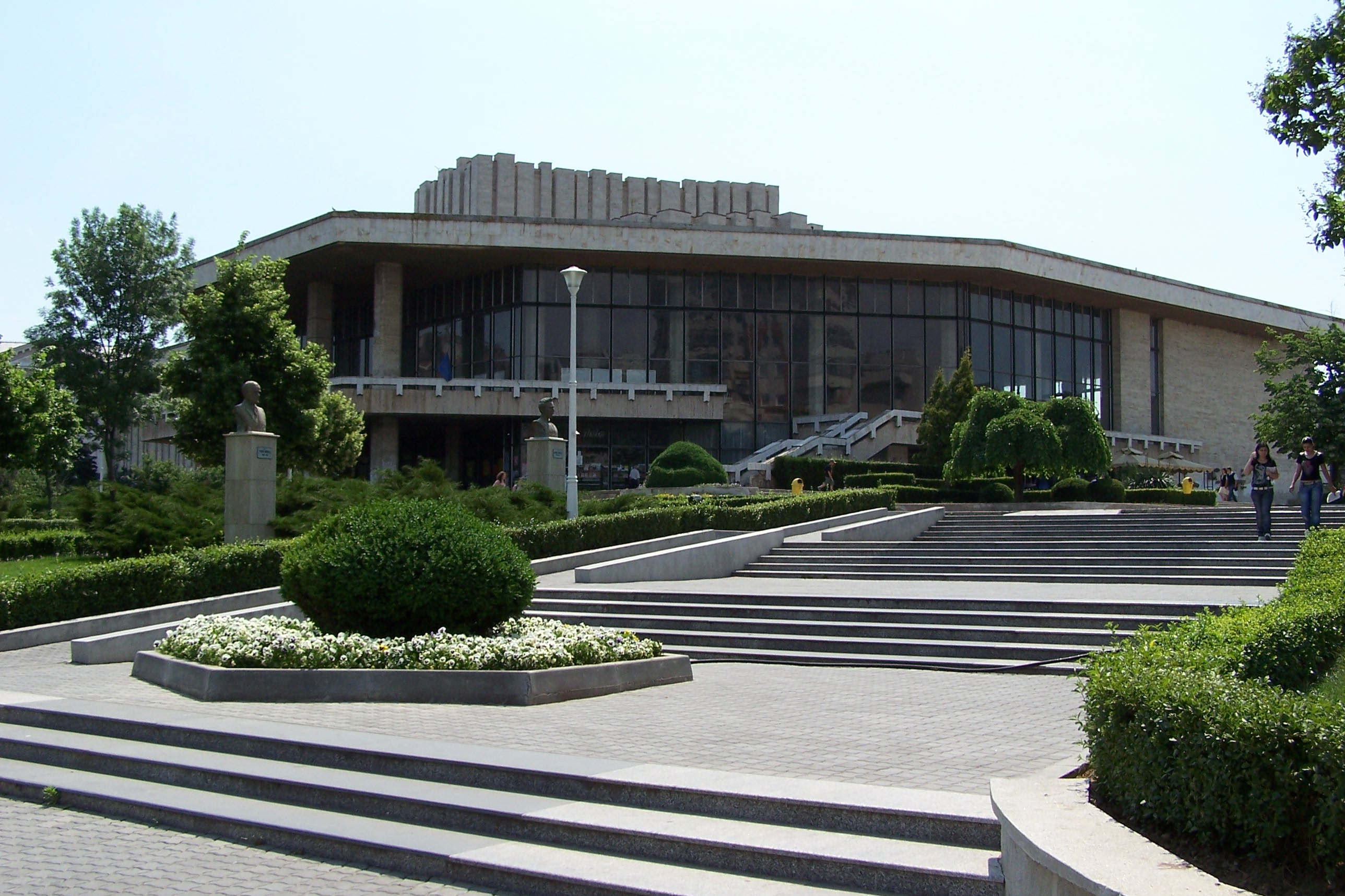 Teatrul Naţional din Craiova